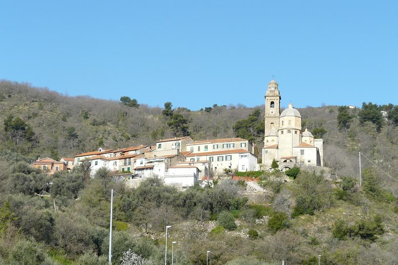 Diano Arentino, Liguria, Italia